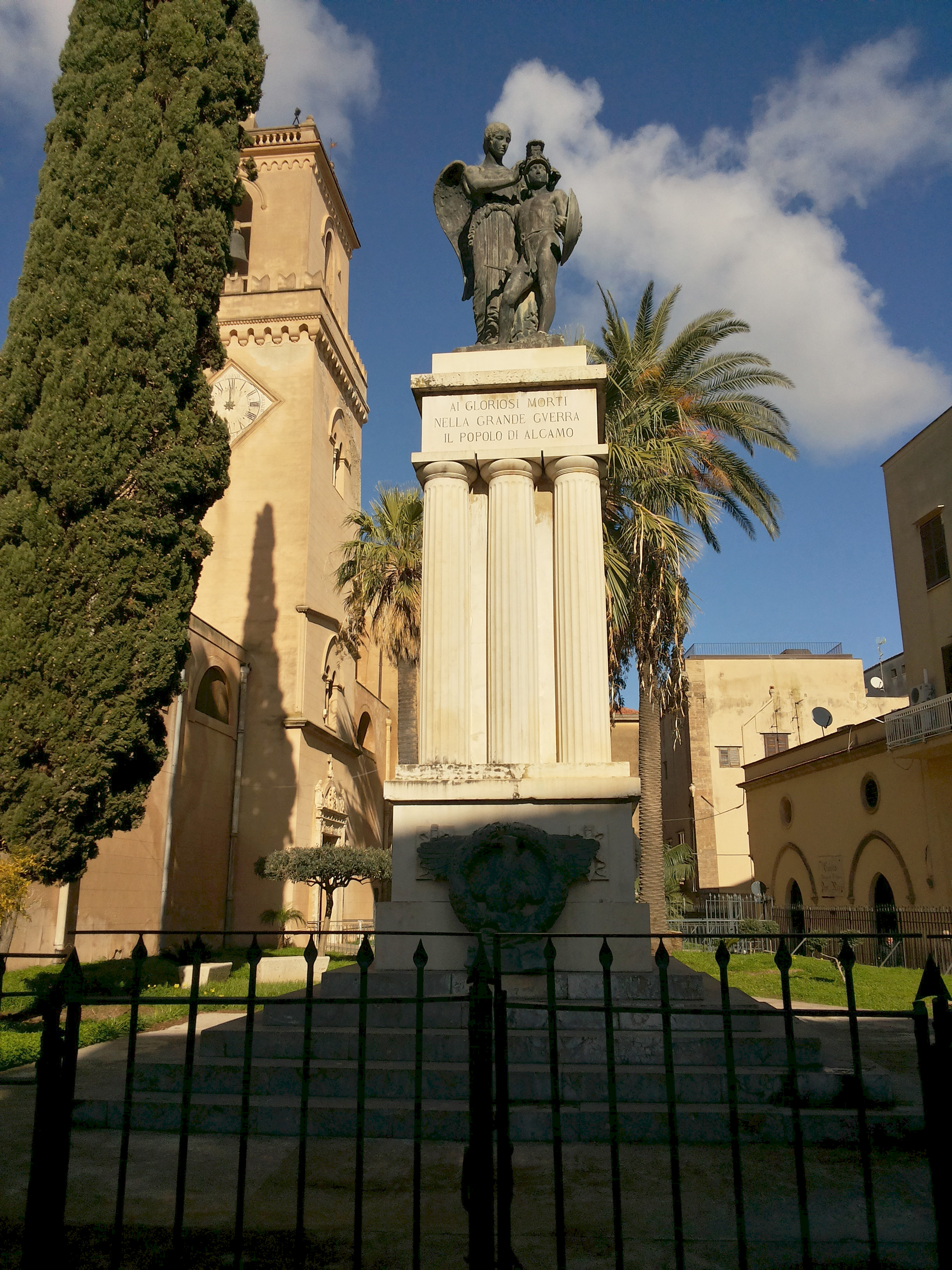 Monumento ai caduti (Alcamo)made by Vincenzo Bentivegna